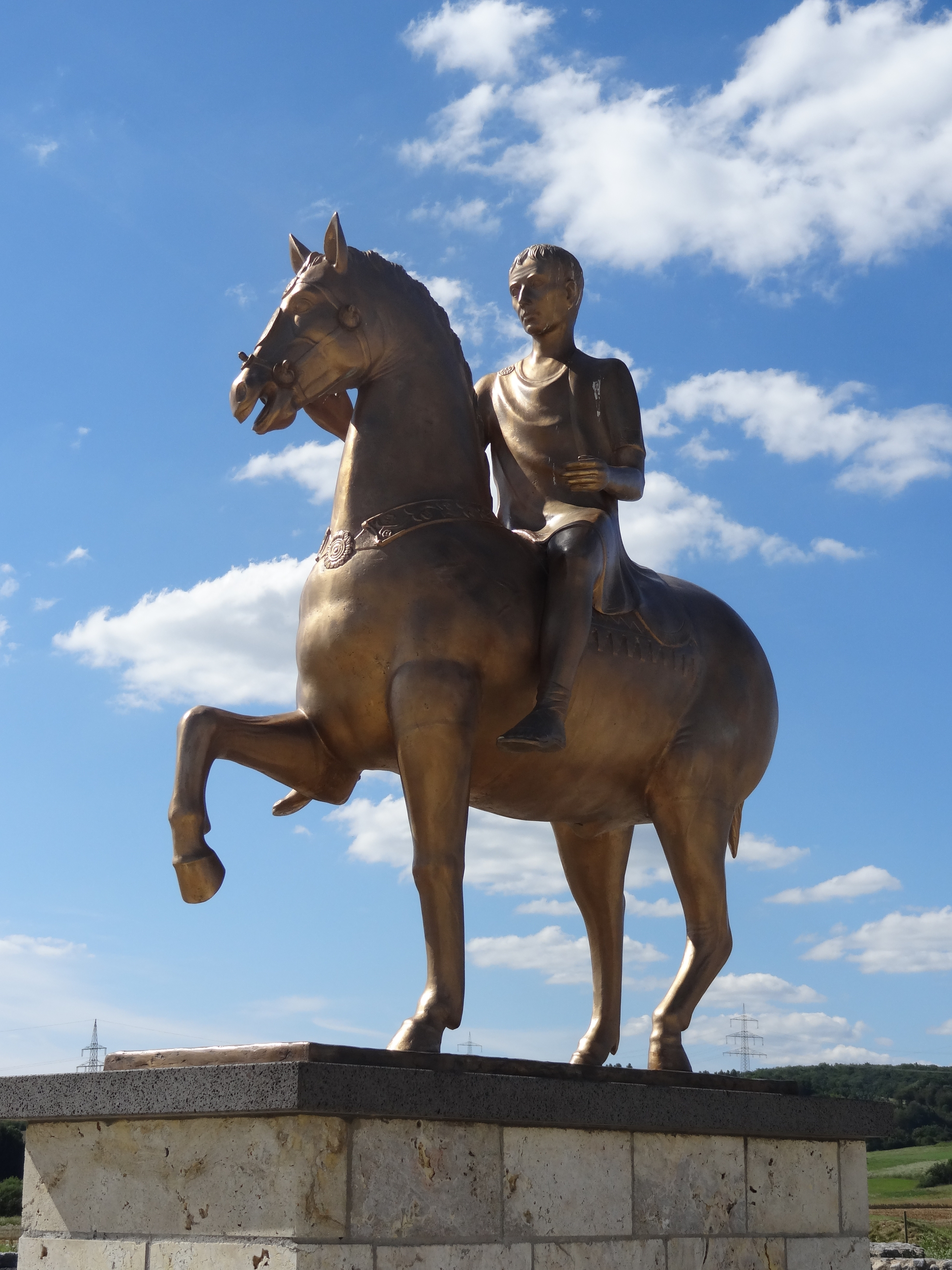 Neuzeitliches Reiterstandbild des Kaisers Augustus im römischen Forum Lahnau-Waldgirmes